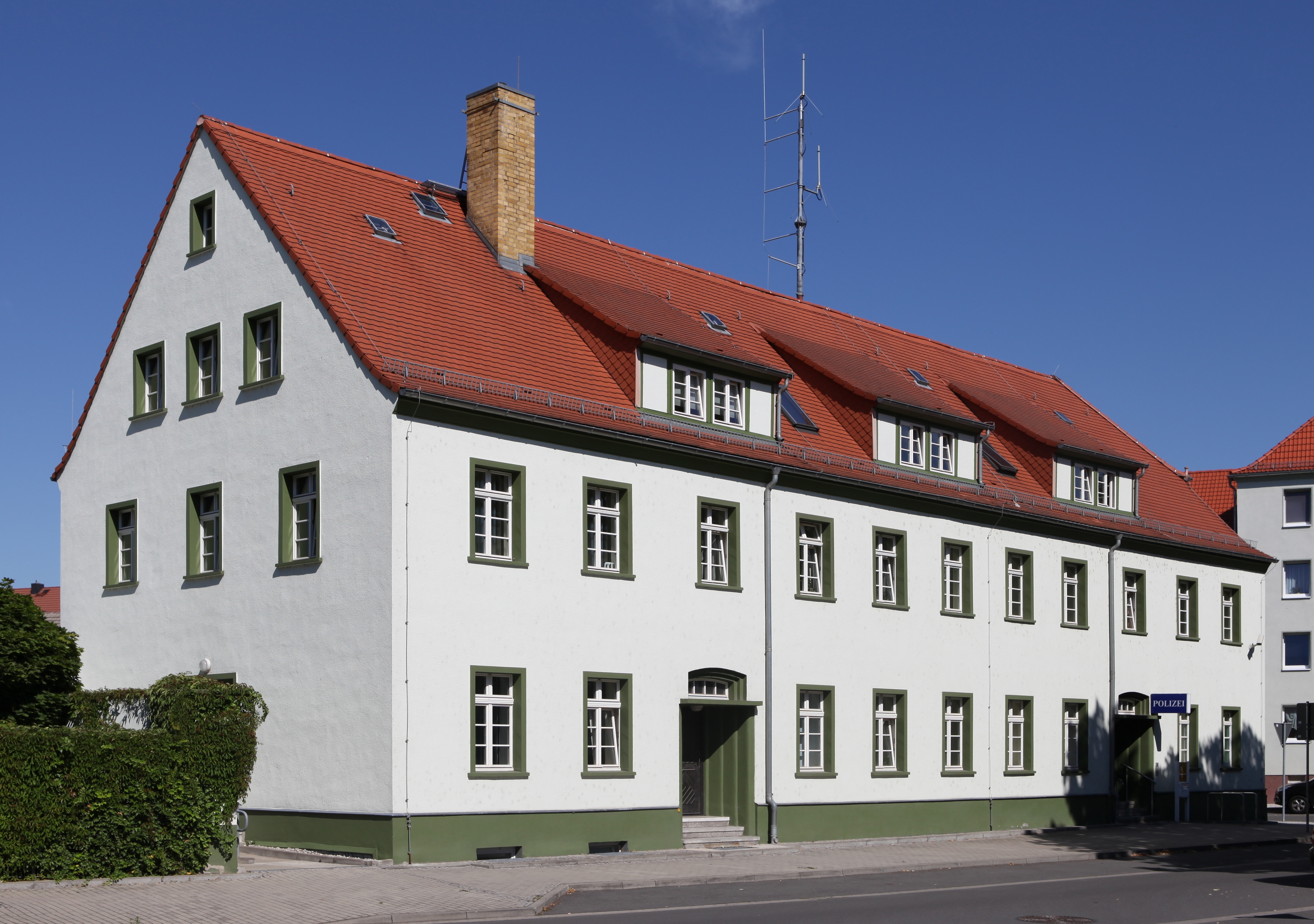 Kulturdenkmal Polizeigebäude Dr.-Külz-Ring 17 in Eilenburg; Objektnummer: 08973336